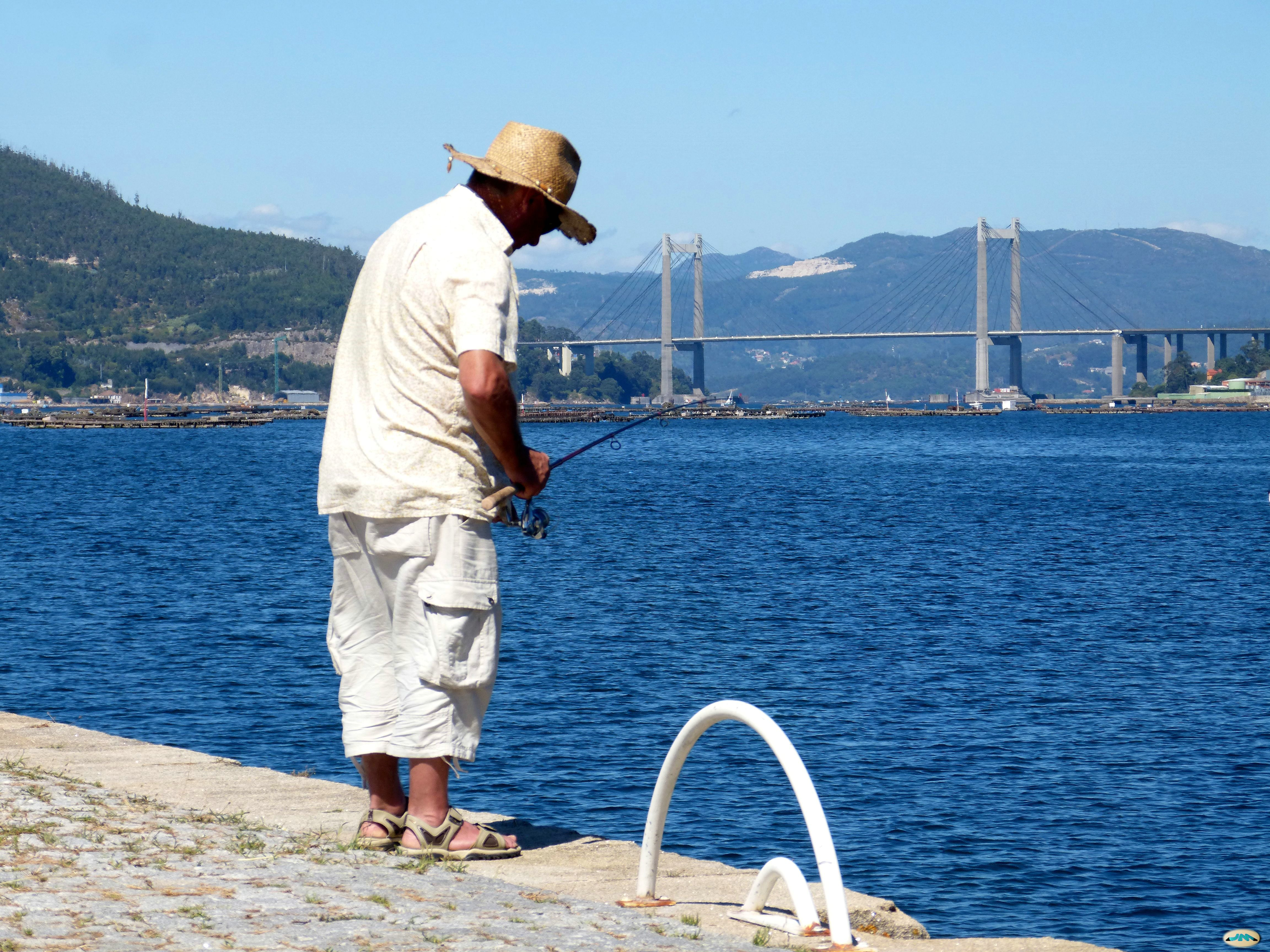 No pican